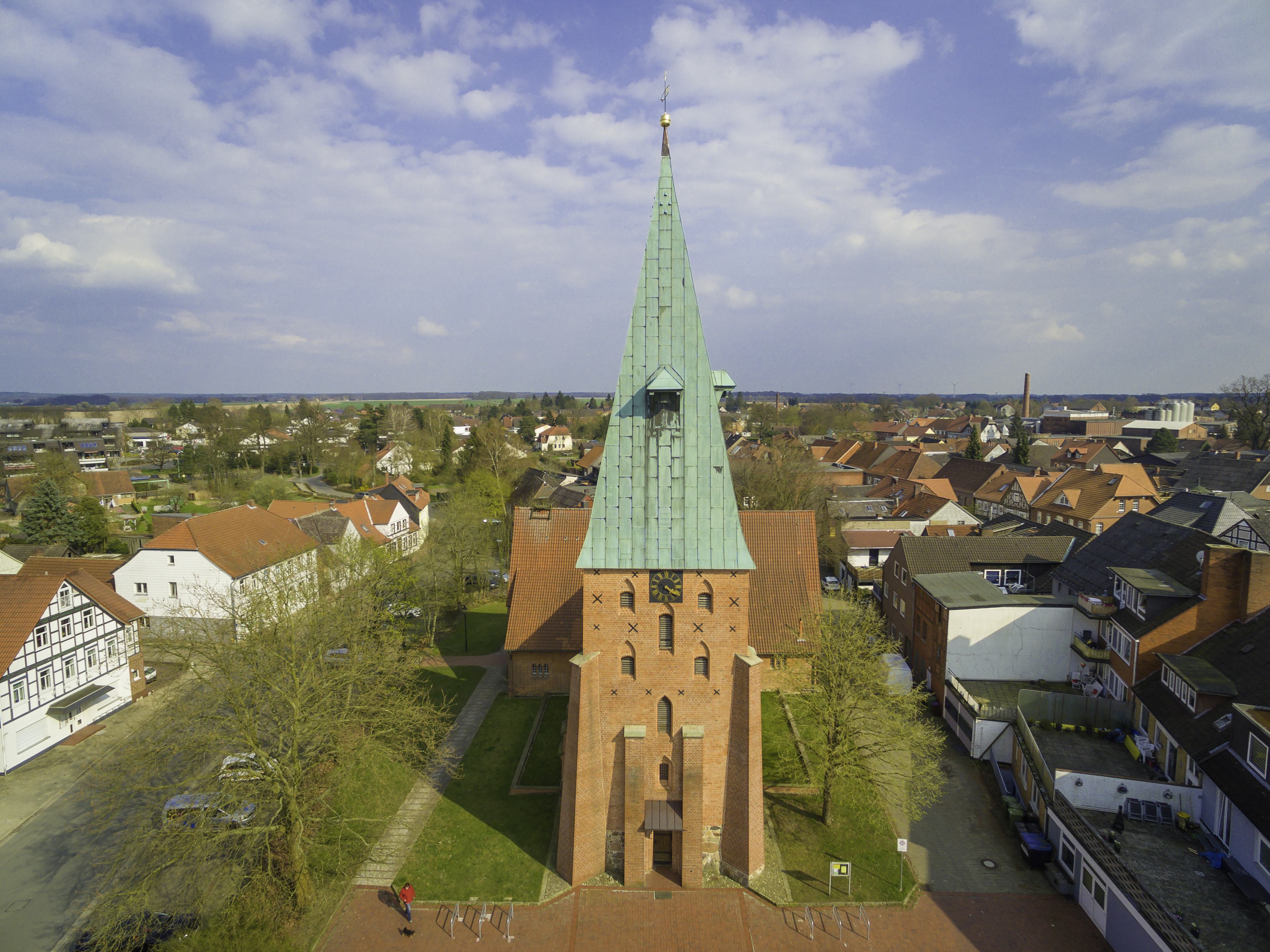 St. Stephanus-Kirche